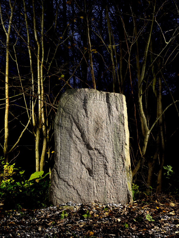 Foto: Nationalmuseet ved Roberto Fortuna